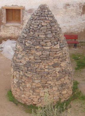 Casilla de pico en Grisel, Stone house in Grisel